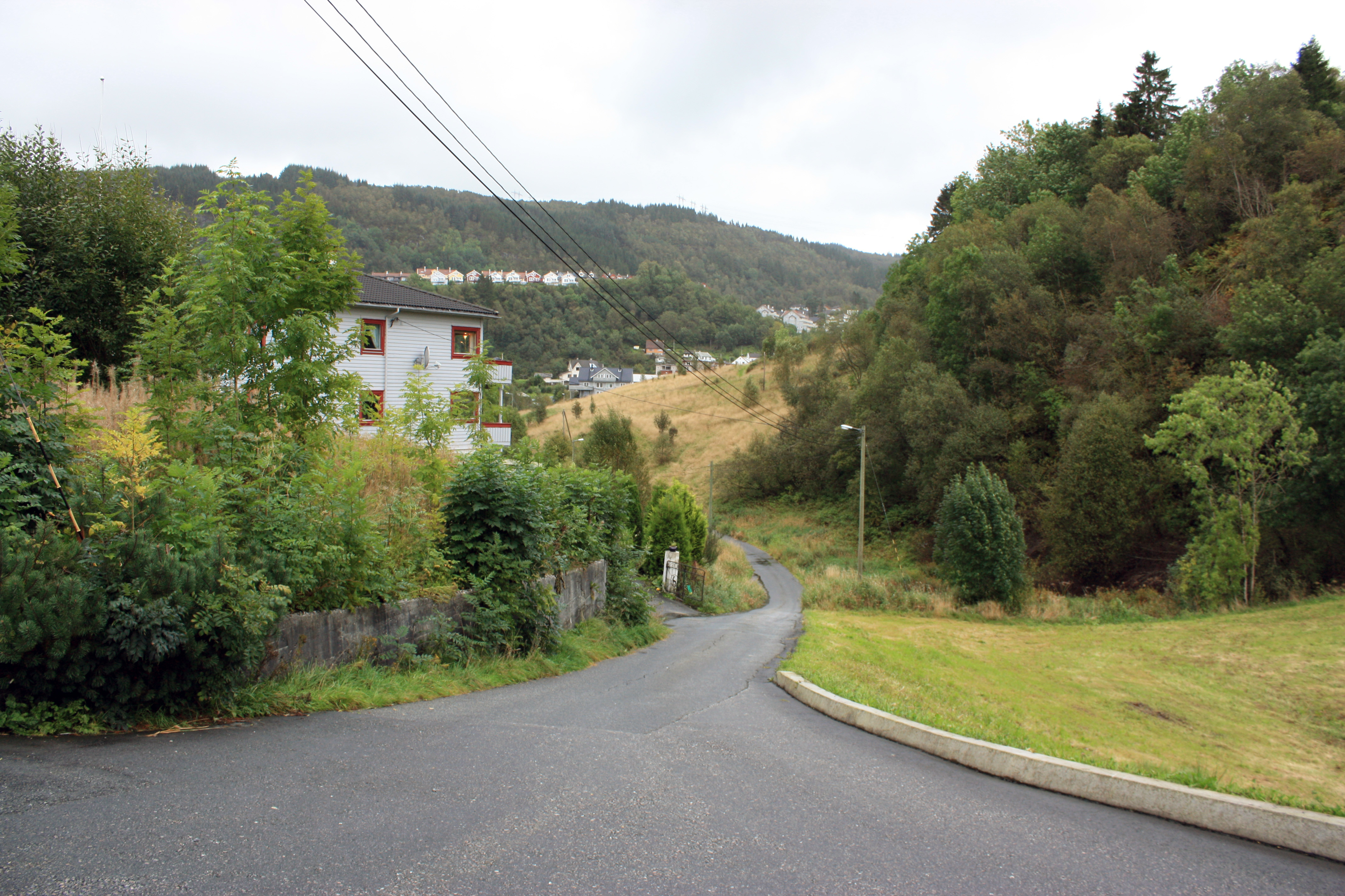 Lilletveitvegen, Fana, Bergen.